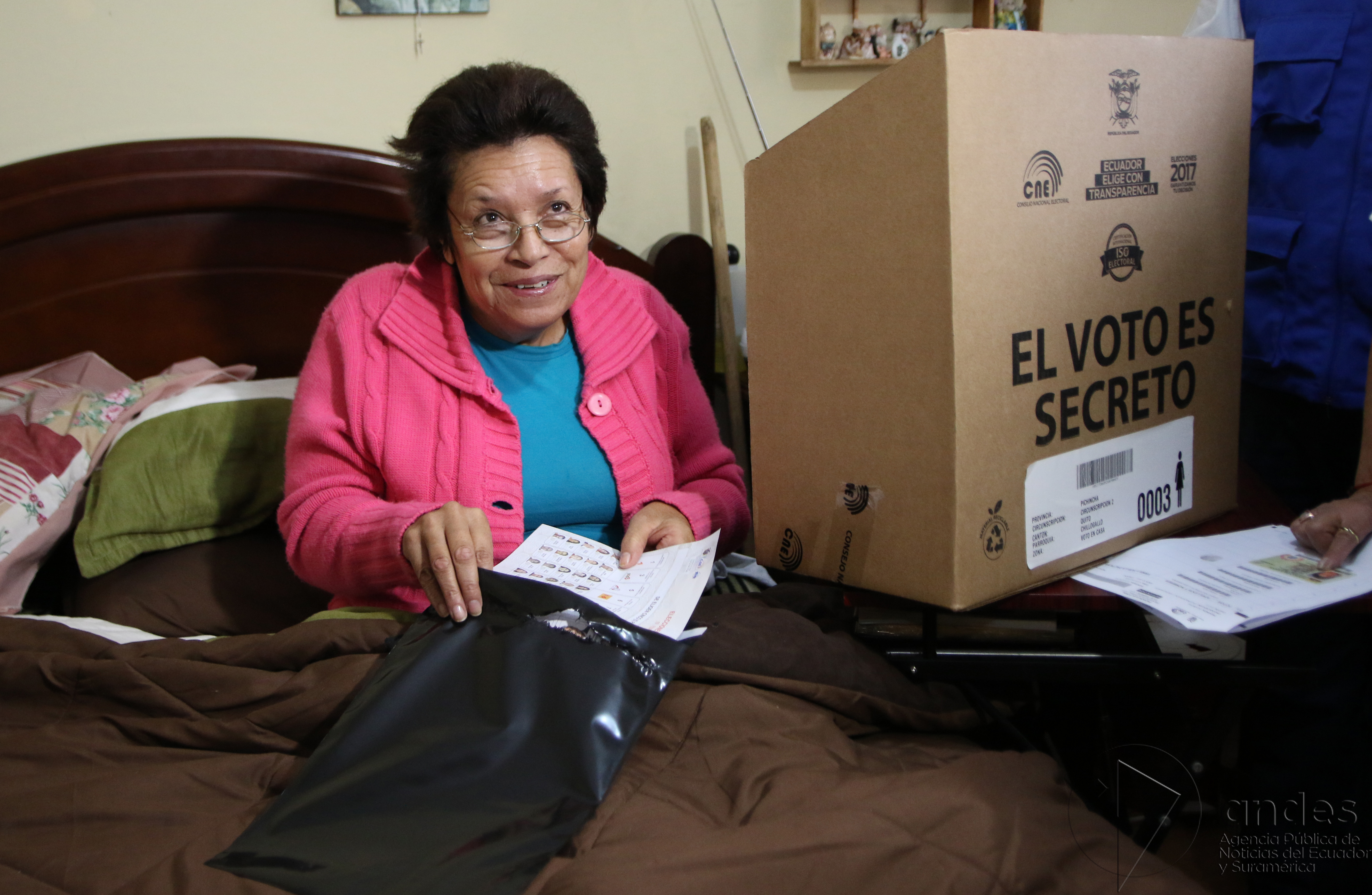 Voto asistido en Ecuador, durante las elecciones del 2017.